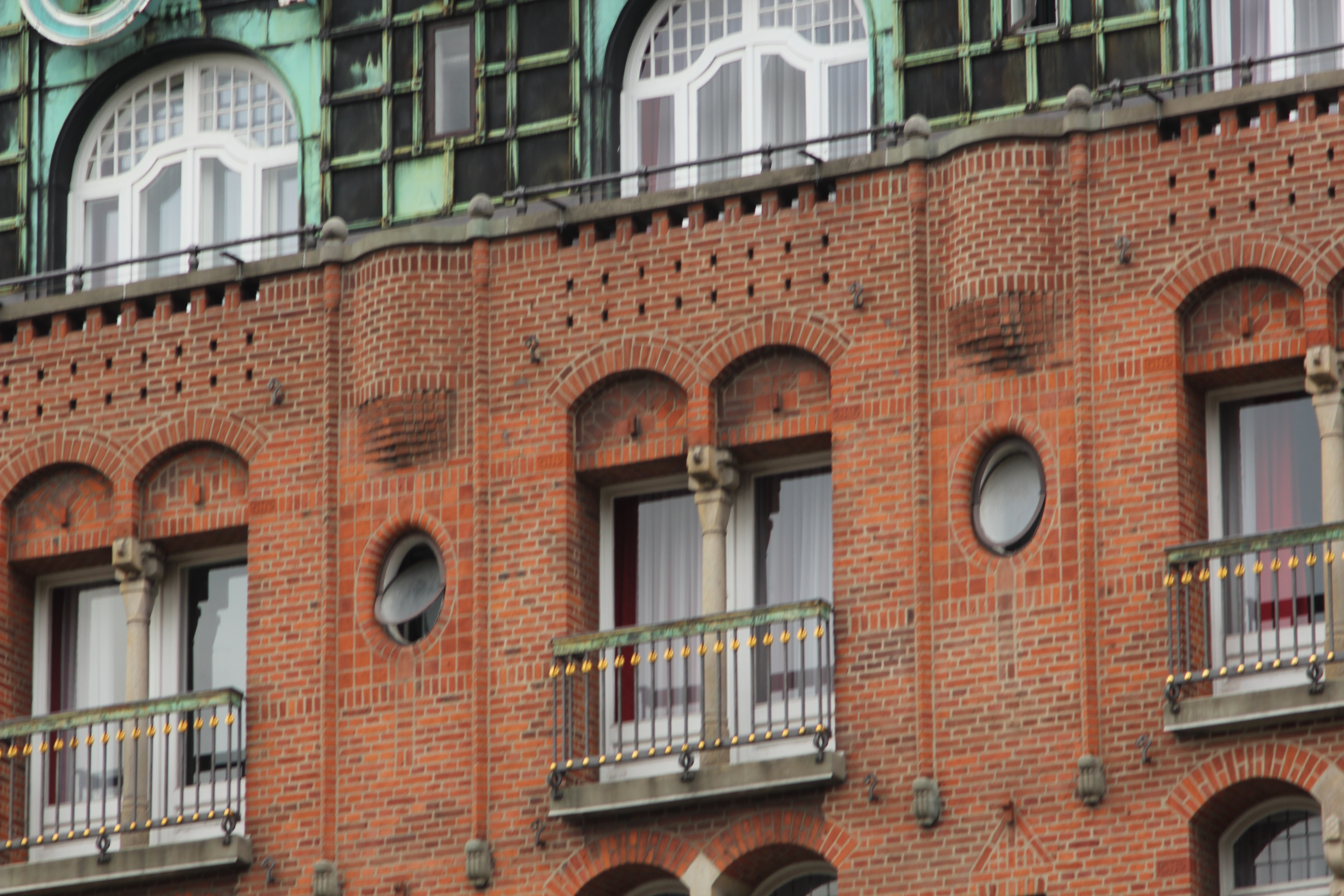 Palace Hotel in Copenhagen, Denmark